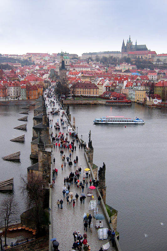 Вид на Карлов Мост и Пражский Град с Восточной Мостовой Башни